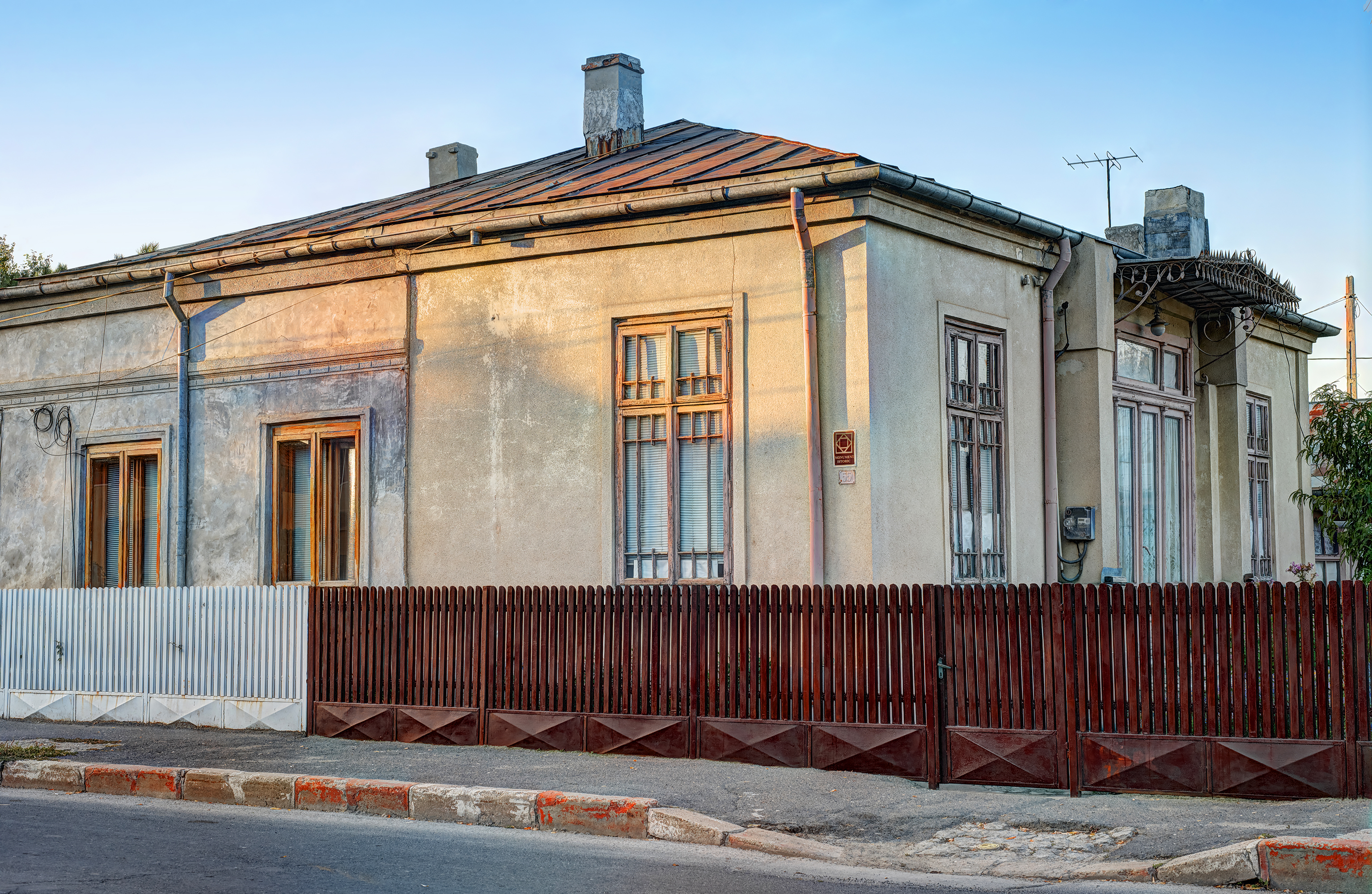 Casa de la numărul 55, Str. Independenței